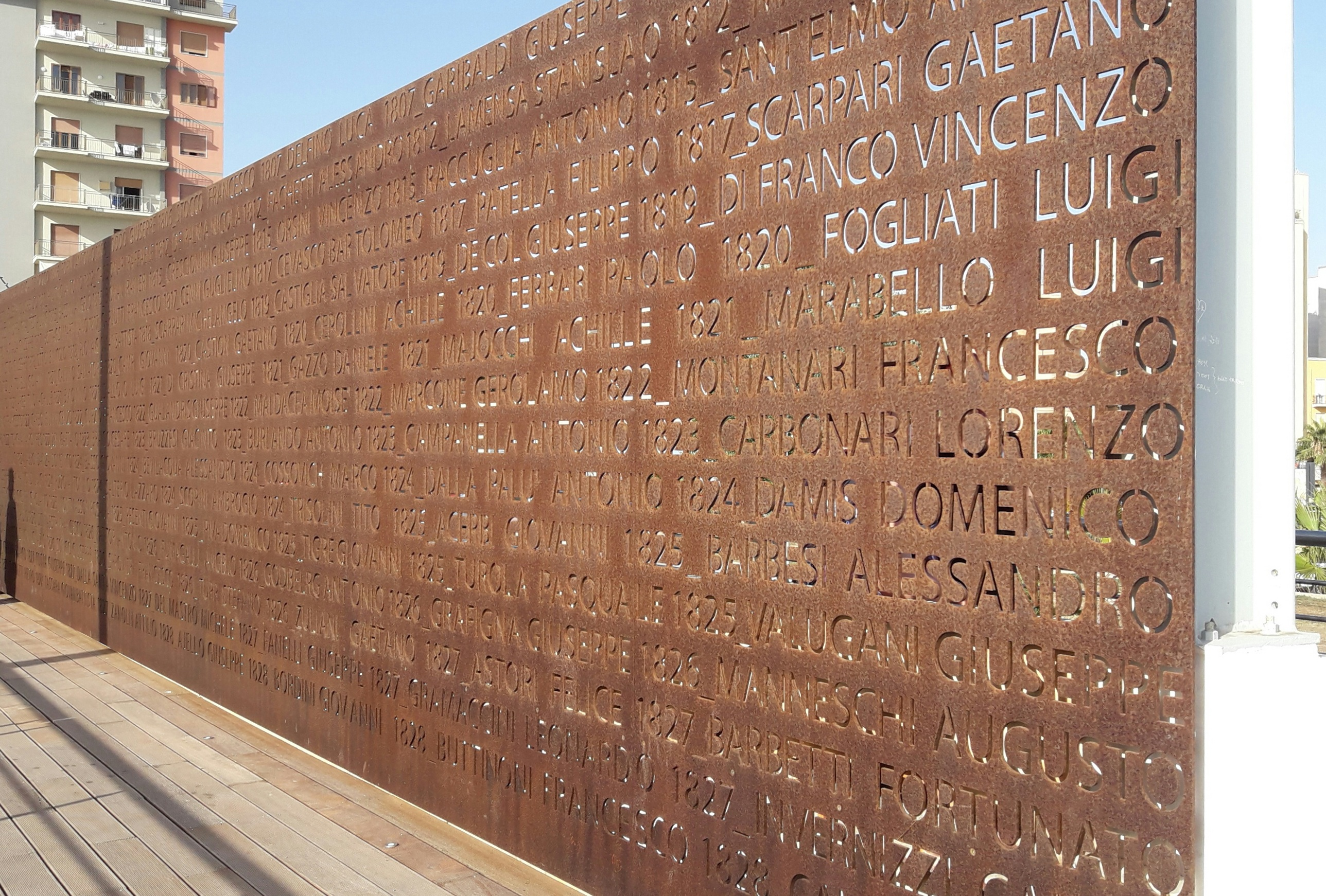 Il monumento ai Mille a Marsala, nel luogo dello sbarco